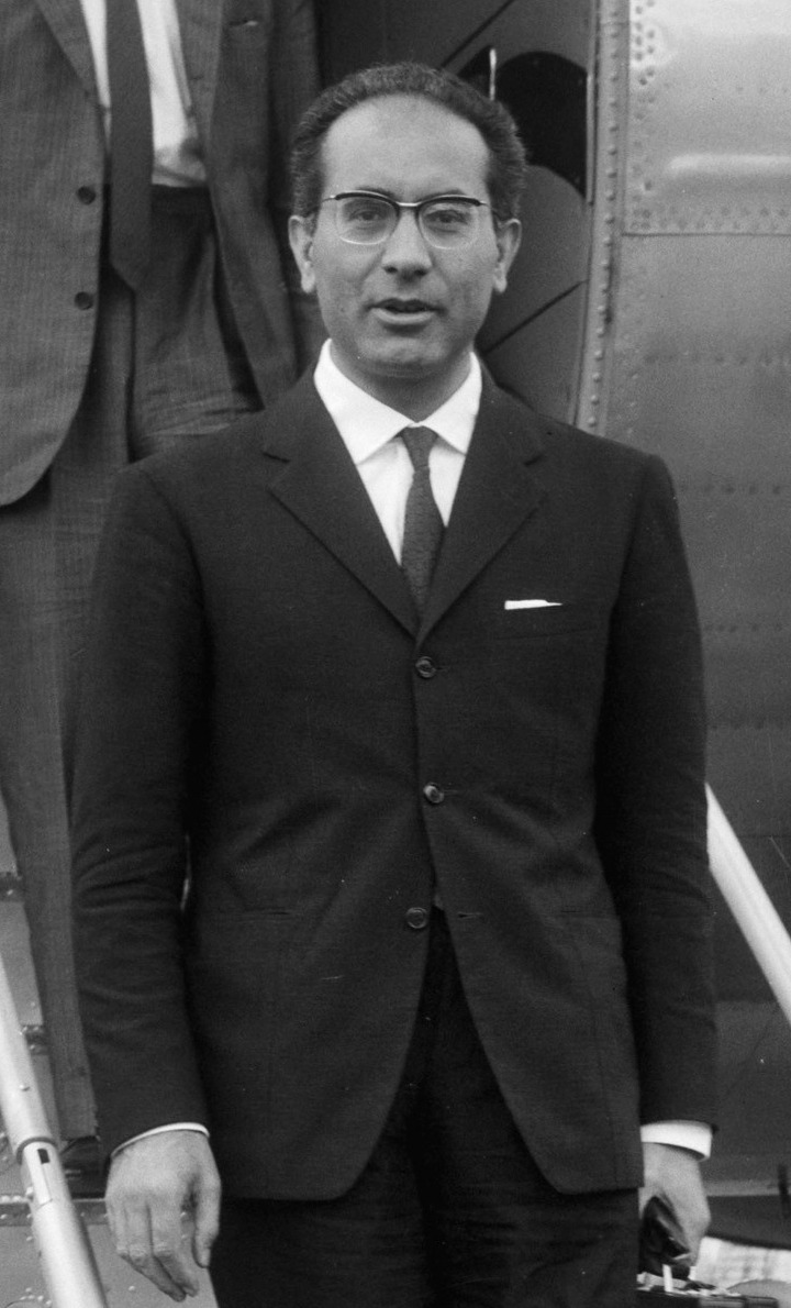 Minister van Financien van Italie Colombo op Schiphol